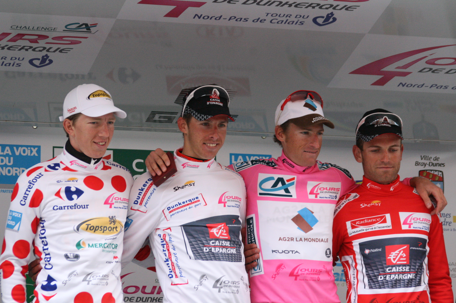 Sep Vanmarcke, Rui Costa, Martin Elmiger et José Joaquín Rojas sur le podium de la 5e étape des Quatre jours de Dunkerque 2010